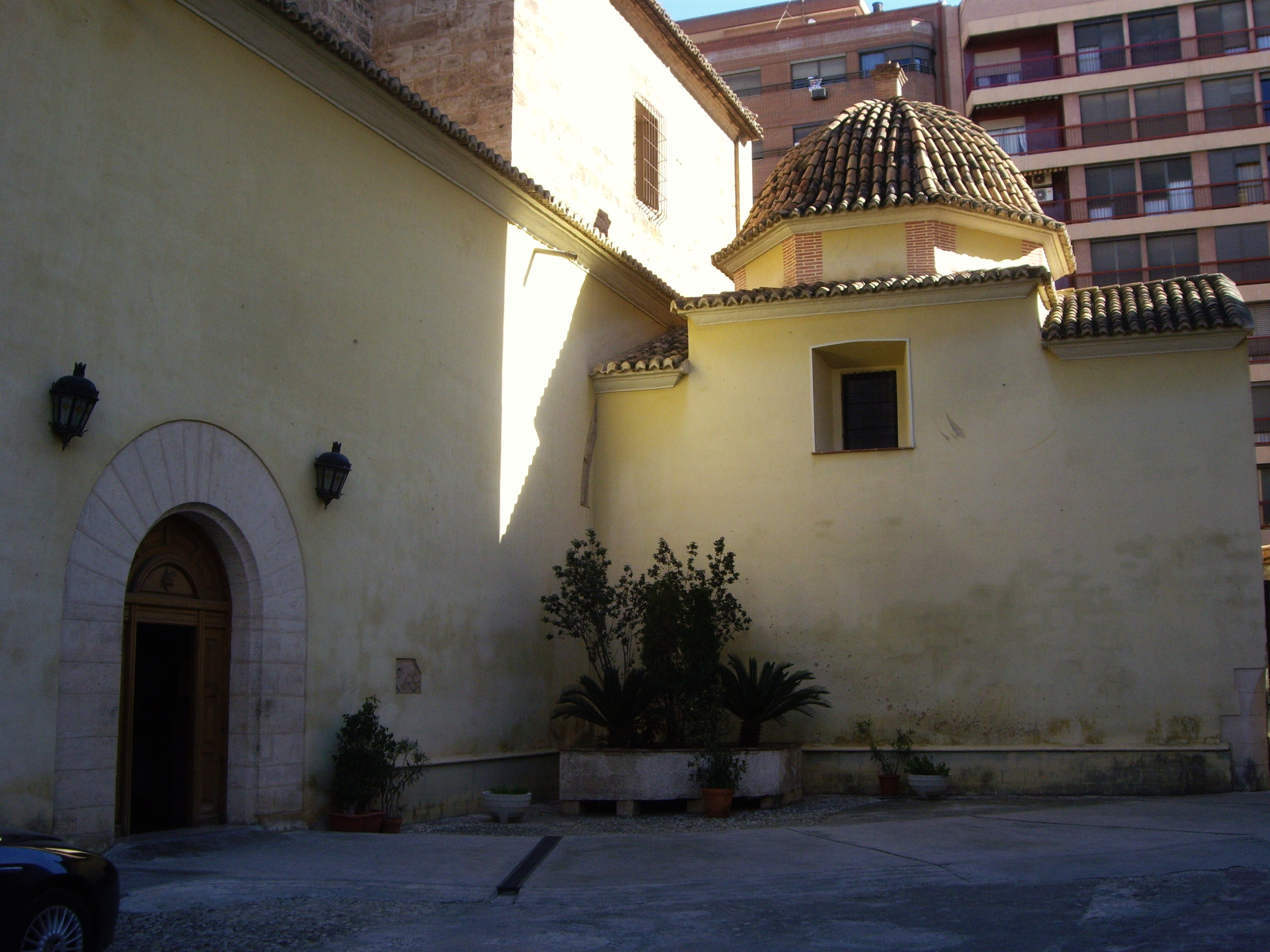 Sant Vicent de la Roqueta, pati.